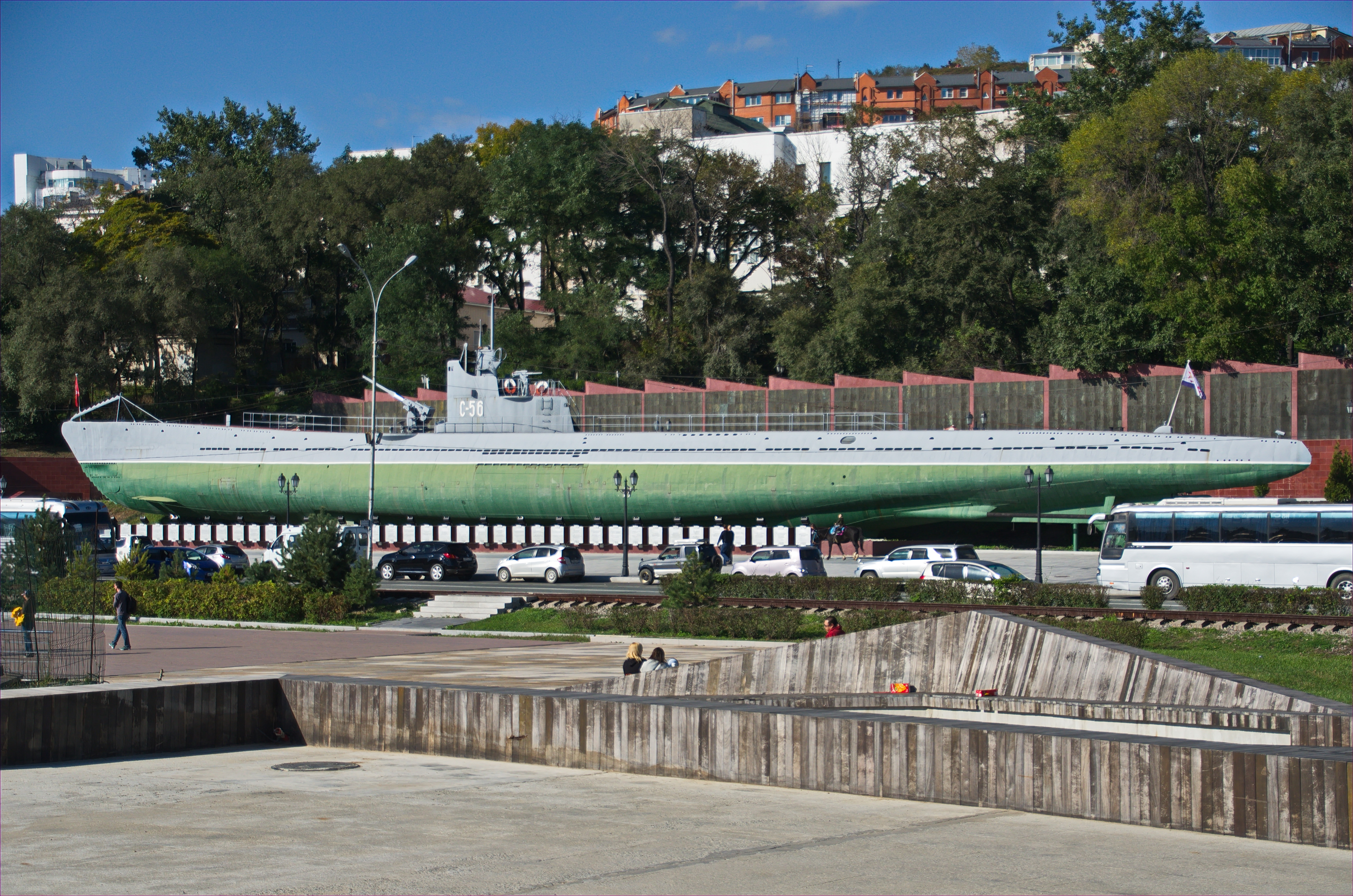 053 - Wladiwostok 2015